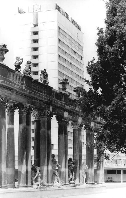 Zentralbild-Link-29.7.70-Ill.-Potsdam: Interhotel und Kolonaden des ehemaligen Stadtschlosses Die von G.W.Knobelsdorff geschaffenen Kolonaden - ehemals Schmuck des Potsdamer Stadtschlosses - Reste preußischer "Herrlichkeit" bilden einen interessanten Kontrast zum modernen Interhotel Potsdam, Zeugnis der Aufbauleistungen unseres Volkes. - Vorbereitendes Bildmaterial zum 25. Jahrestag Potsdiabkommen-"